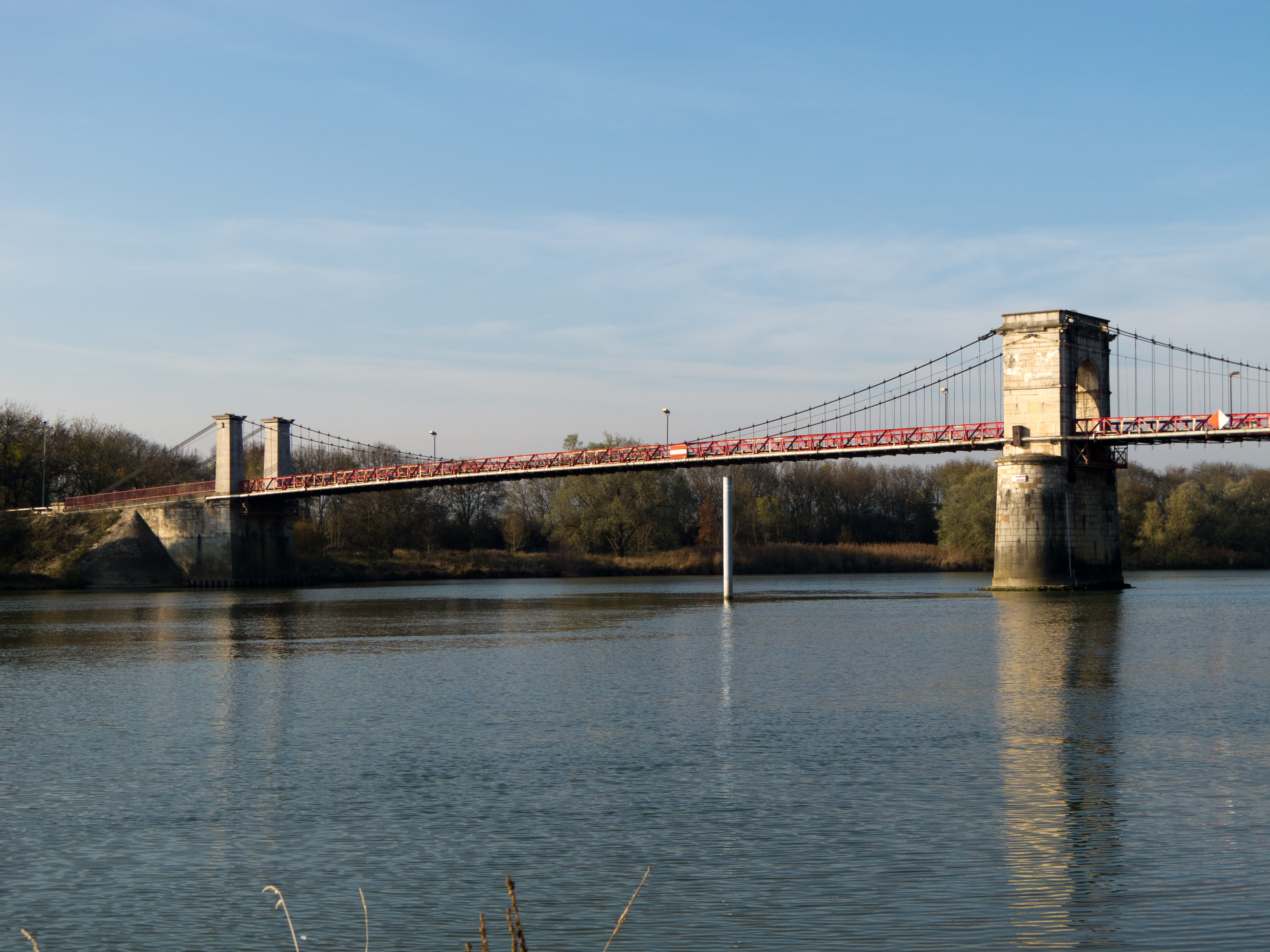 Pont suspendu de Beauregard - Villefranche-sur-Saone - Beauregard - Ain - France